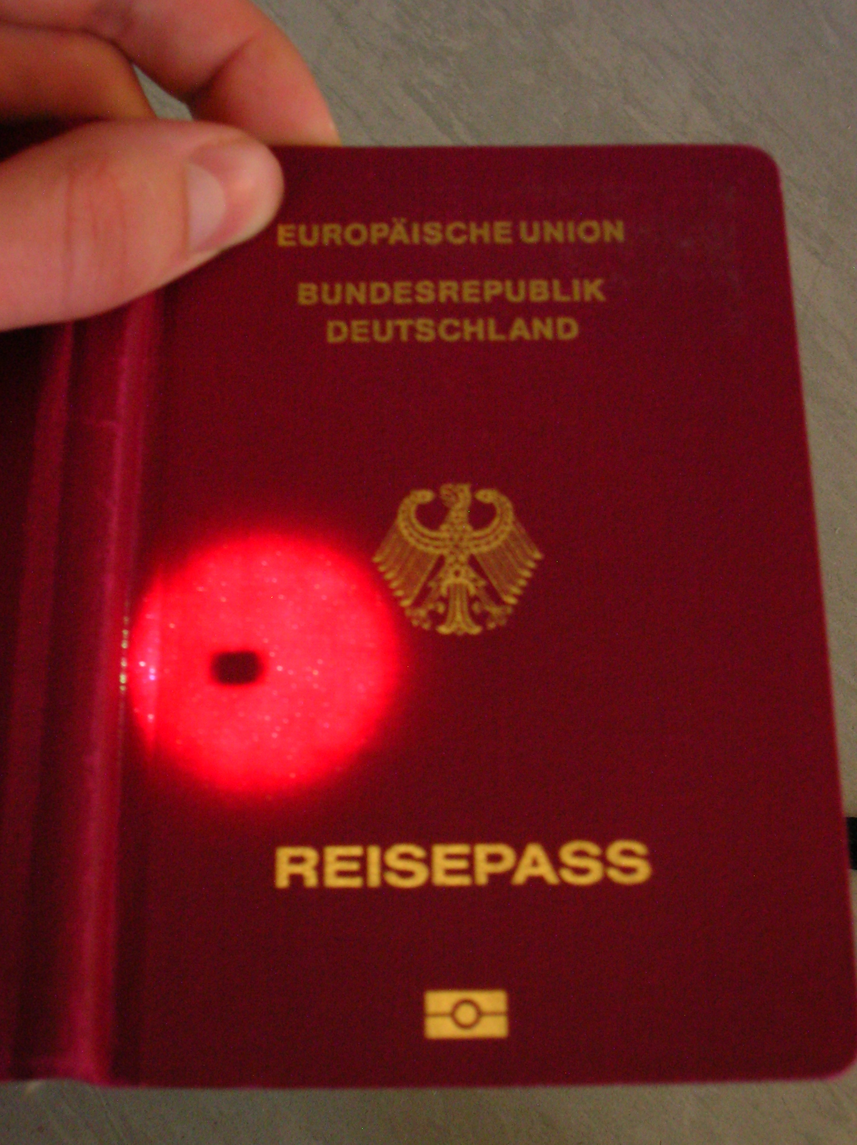 Beleutet man den deutschen Reisepass von unten her mit einer starken Taschenlampe, wird der eingebaute RFID-Chip sichtbar. Made by Grillenmann